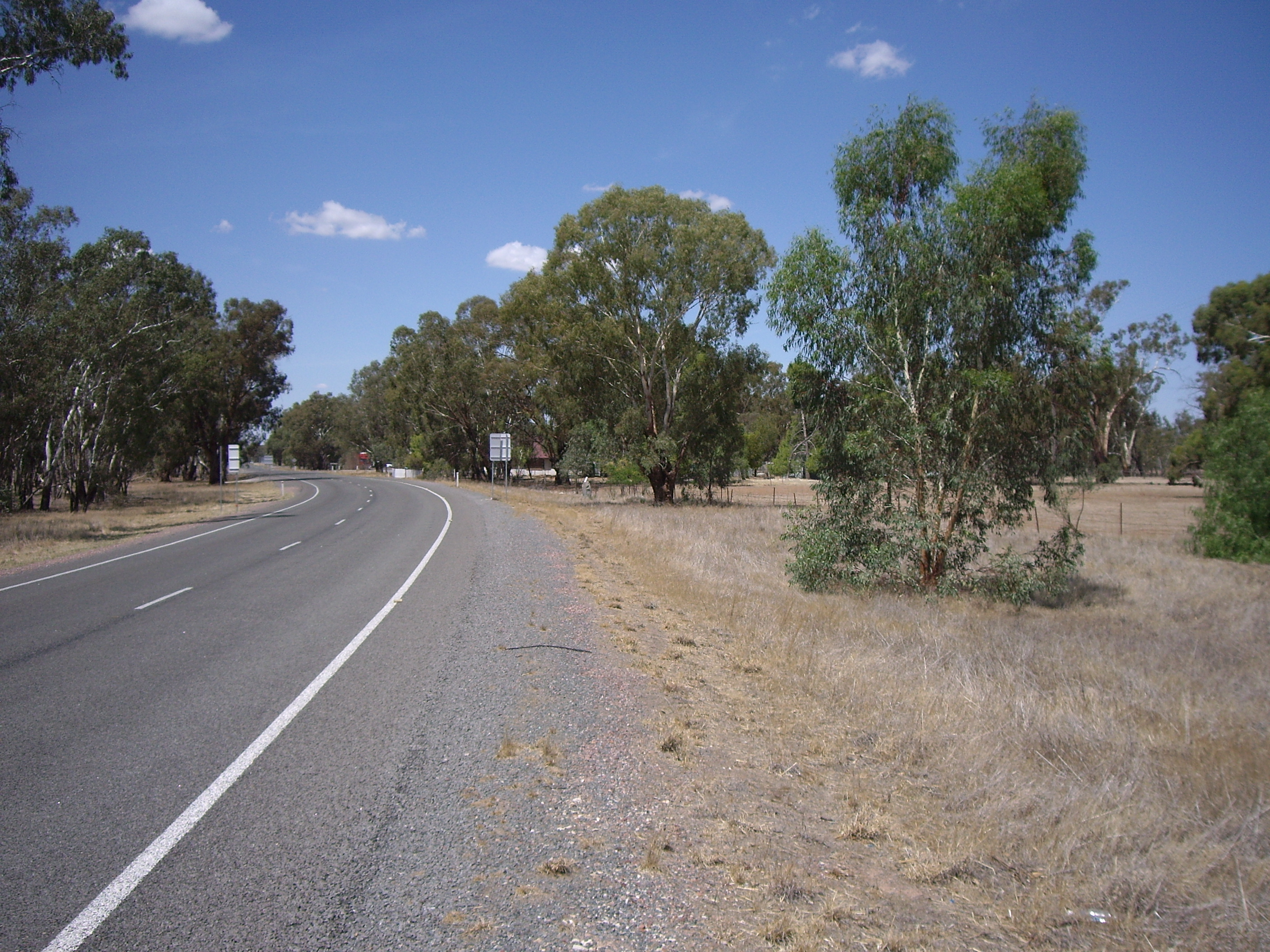 Sandigo